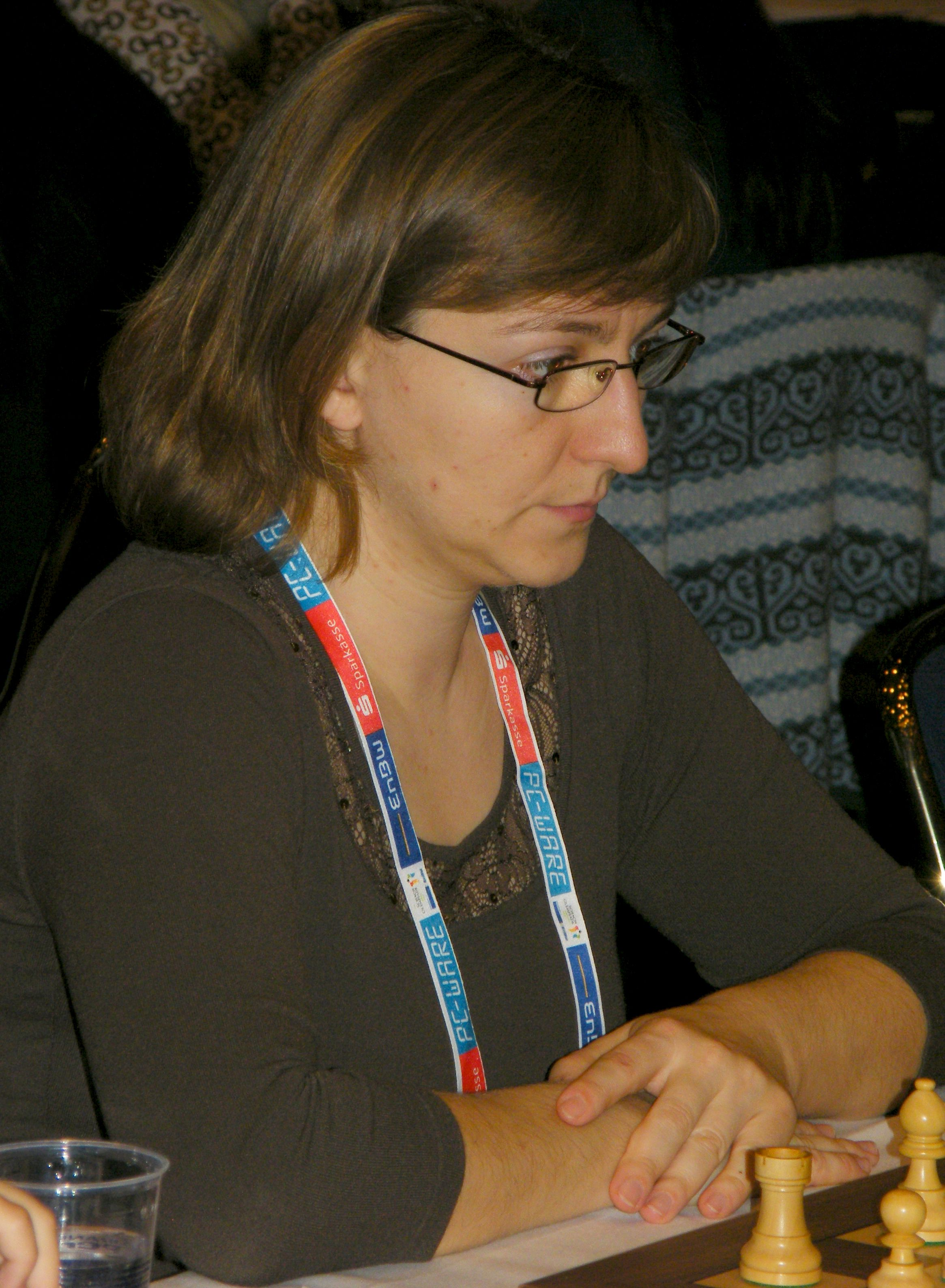 Natalja Khoudgarian bei der 38. Schacholympiade in Dresden 2008